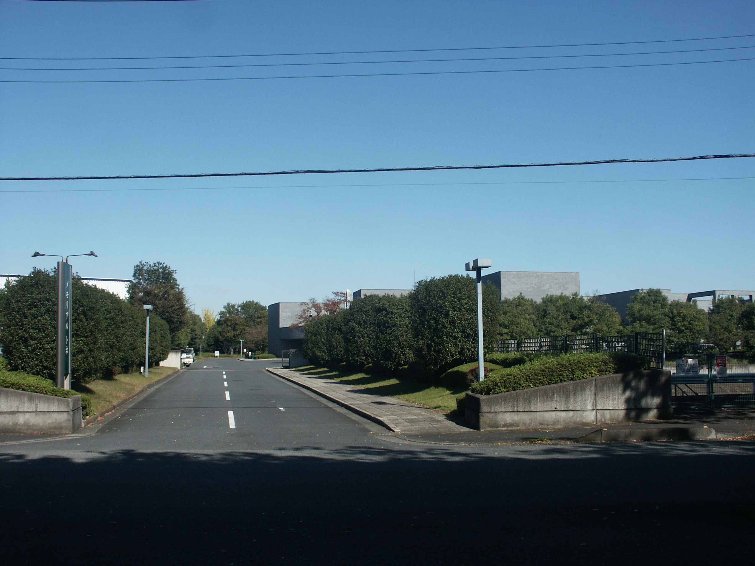 メモリアルトネ（広域利根斎場組合）斎場入口付近